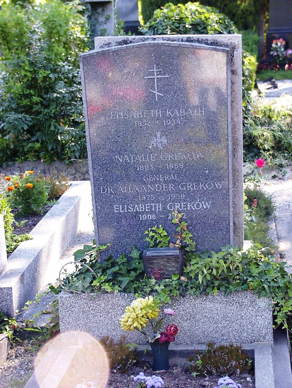 могила військового міністра УНР та командувача Галицької армії генерала Олександра Грекова у м. Санкт-Андре-Вердерн, Австрія